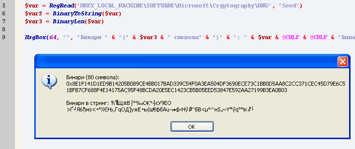 Четене от CryptoAPI чрез програма, написана на AutoIt